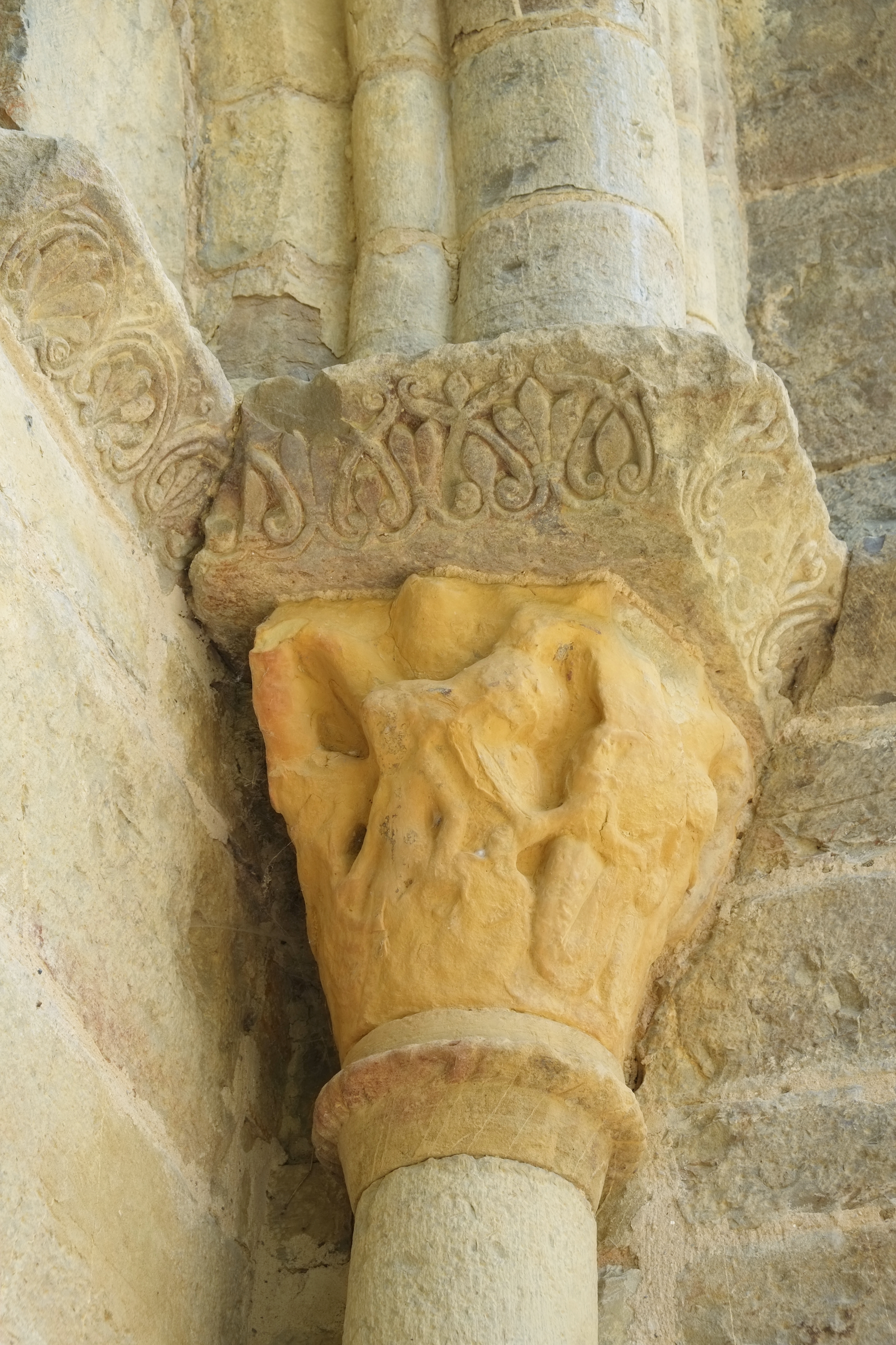 Ehemalige Klosterkirche San Adrián de Sasabe in Borau in der Provinz Huesca in Aragonien (Spanien)